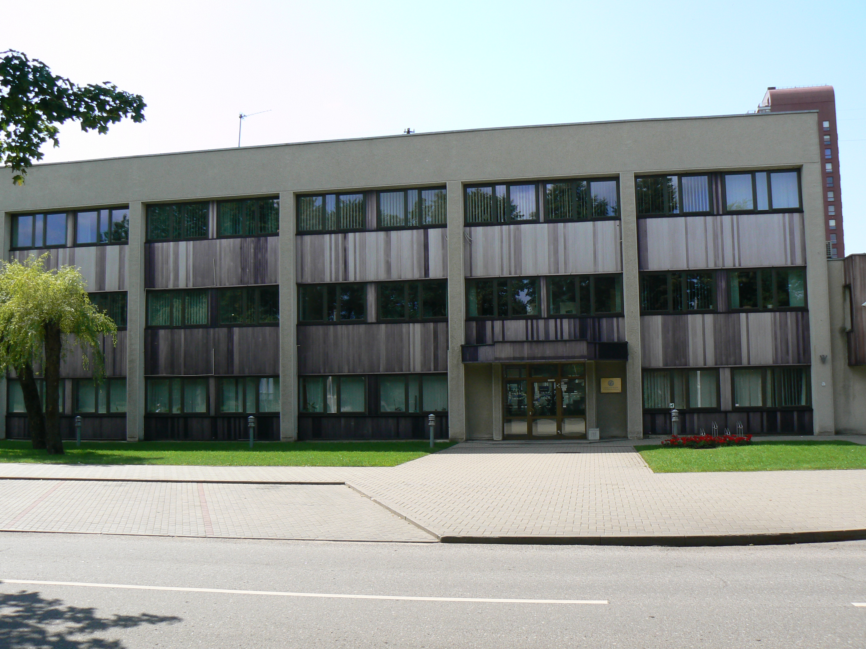 Úřadovna distributorského plynofikačního podniku UAB Lietuvos dujos v Klajpedě